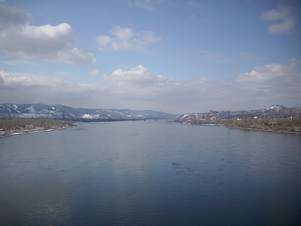 Енисей в г. Красноярск